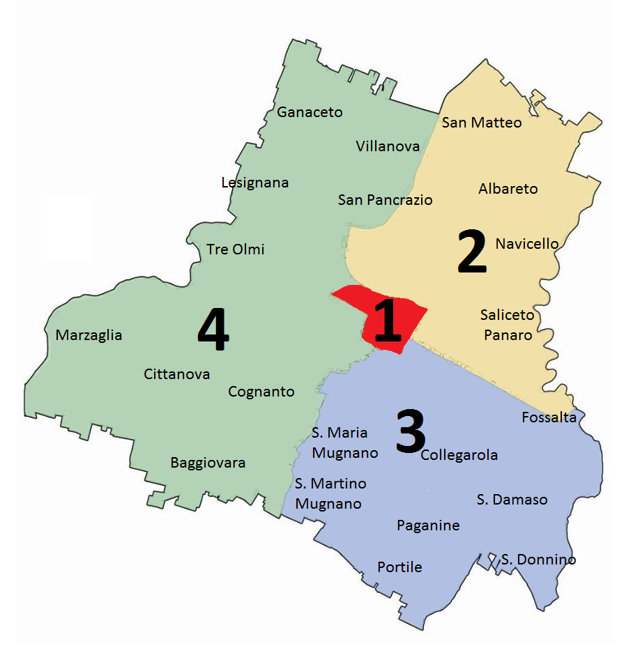 QUARTIERI SUDDIVISI IN ZONE